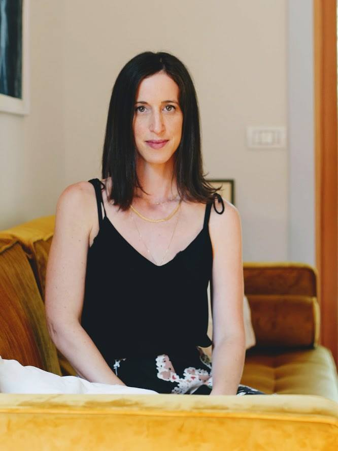 שרי שביט